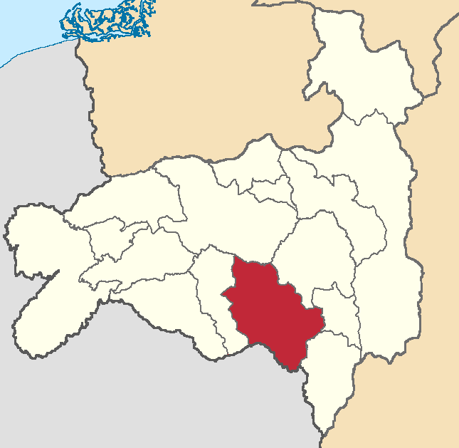 Mapa localizador del cantón en Loja, Ecuador